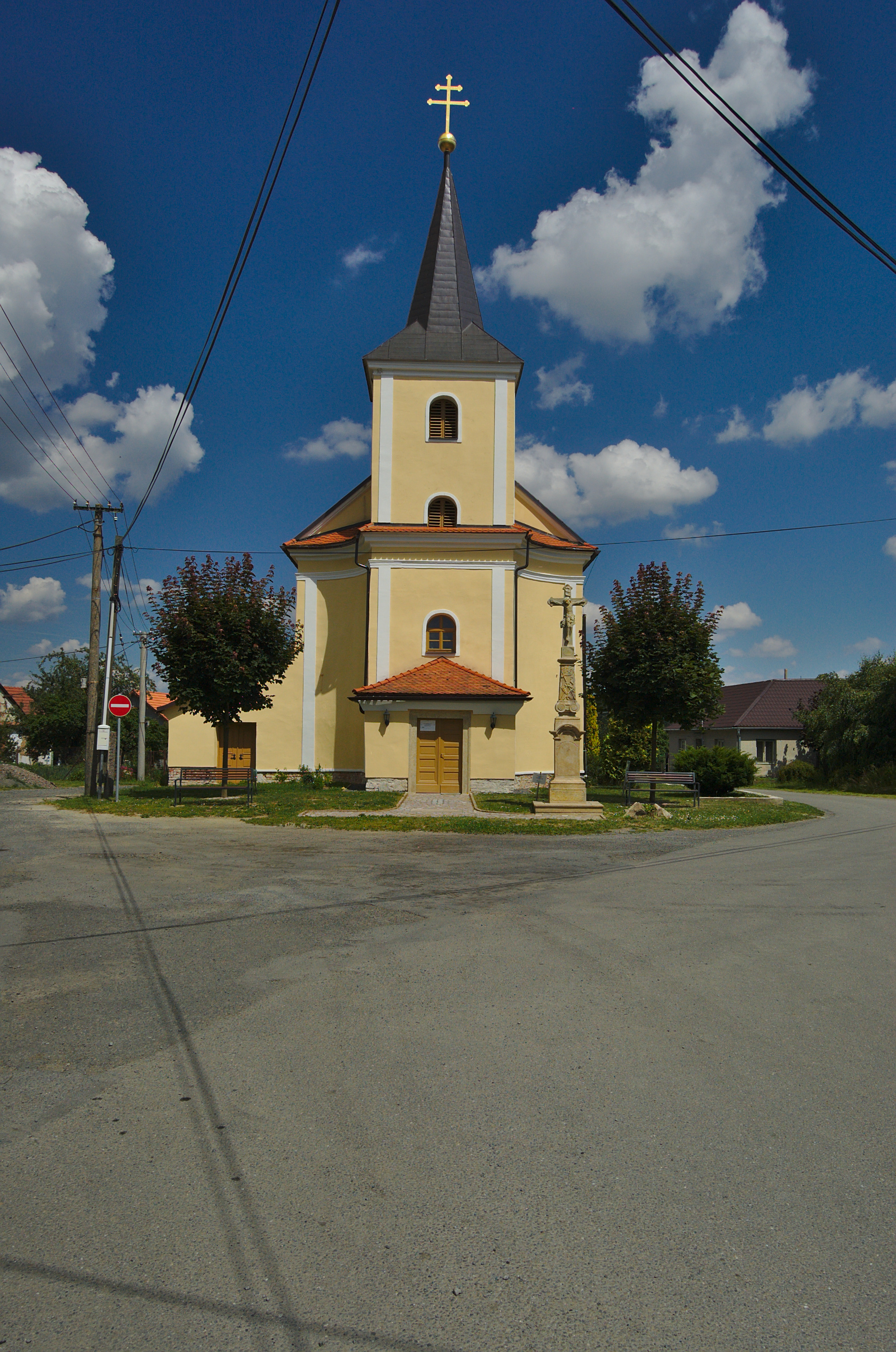 Kostel Panny Marie Bolestné, Šubířov, okres Prostějov